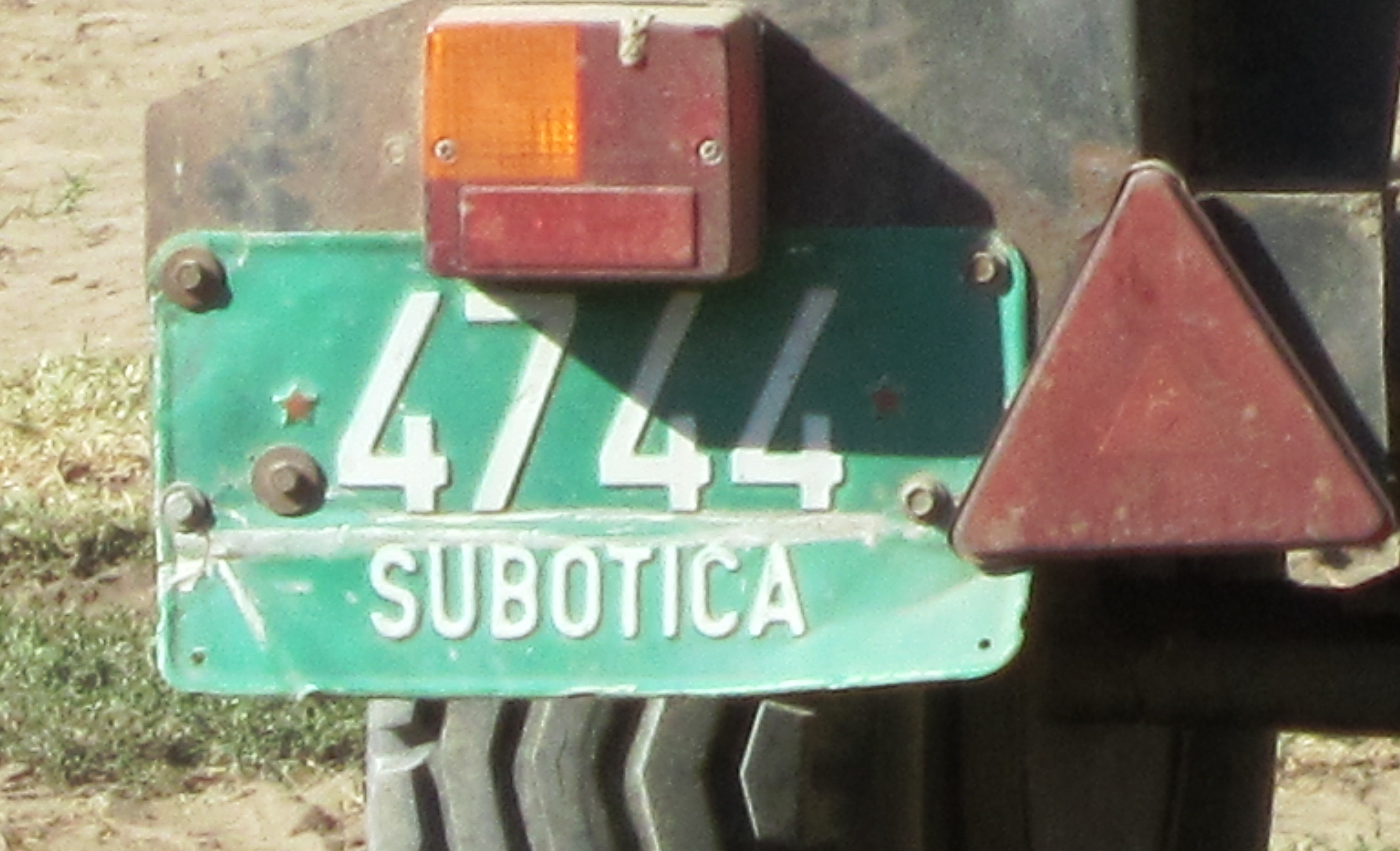 Servië landbouwvoertuig kenteken oud Subotica